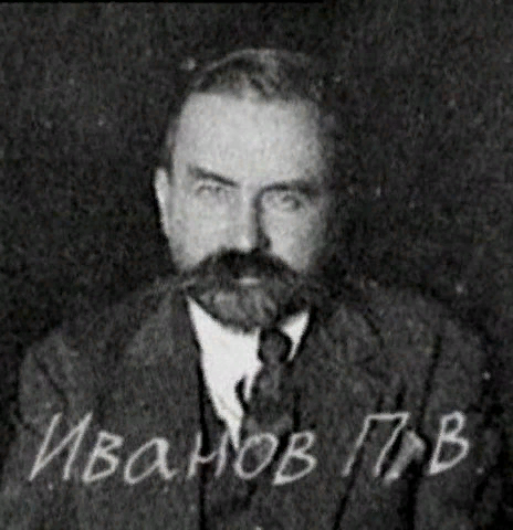 Заключенный «Иванов Петр Васильевич»